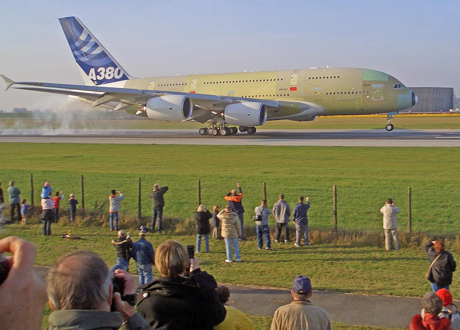 Das Bild zeigt den Airbus A380 MSN 002 bei seiner ersten Landung in Hamburg Finkenwerder am 8. November 2005 um 14:18. Es ist das zweite von drei Versuchsflugzeugen und das erste, das mit einer Kabine ausgestattet wird.